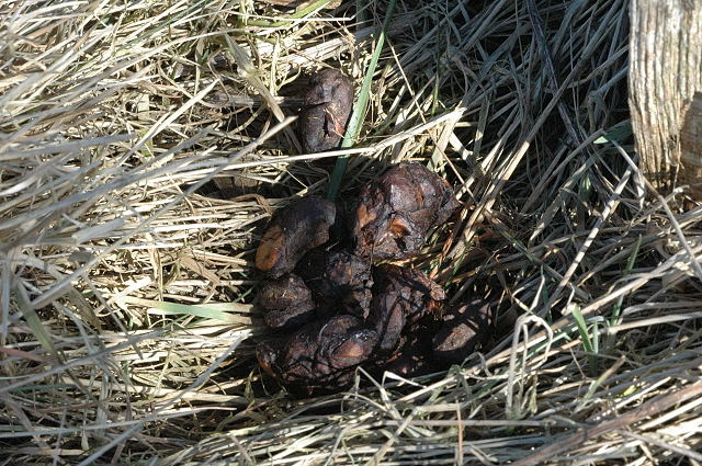 Meles meles droppings, from Commanster, Belgian High Ardennes (50°15'20``N,5°59'58``E)